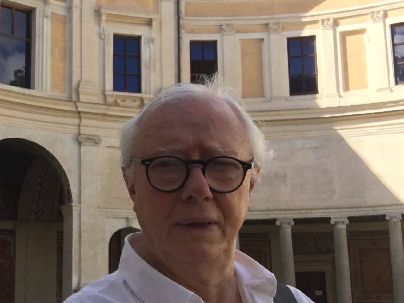 Escritor, periodista y docente uruguayo